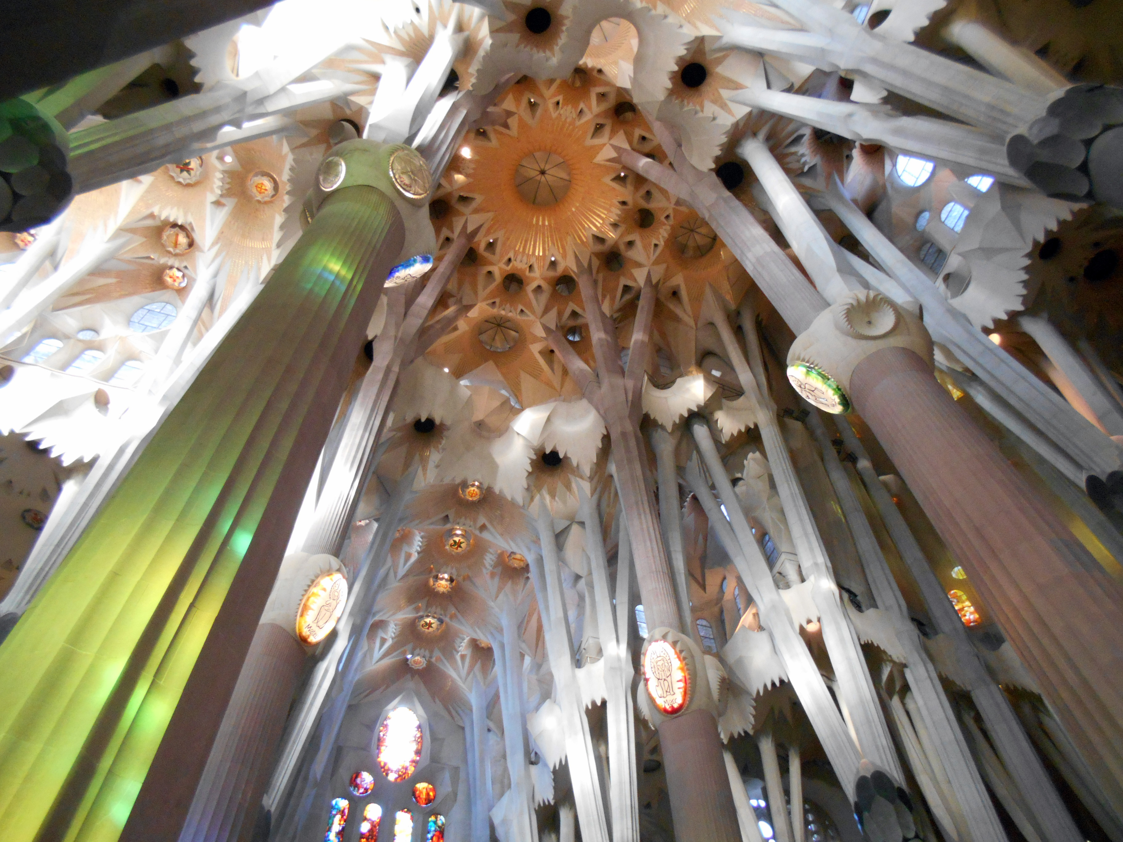 Bóveda de la Sagrada Familia.